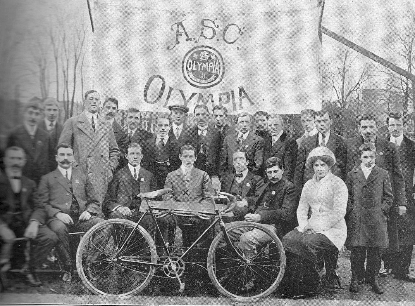 ASC Olympia, niederländischer Radsportverein, ca. 1901